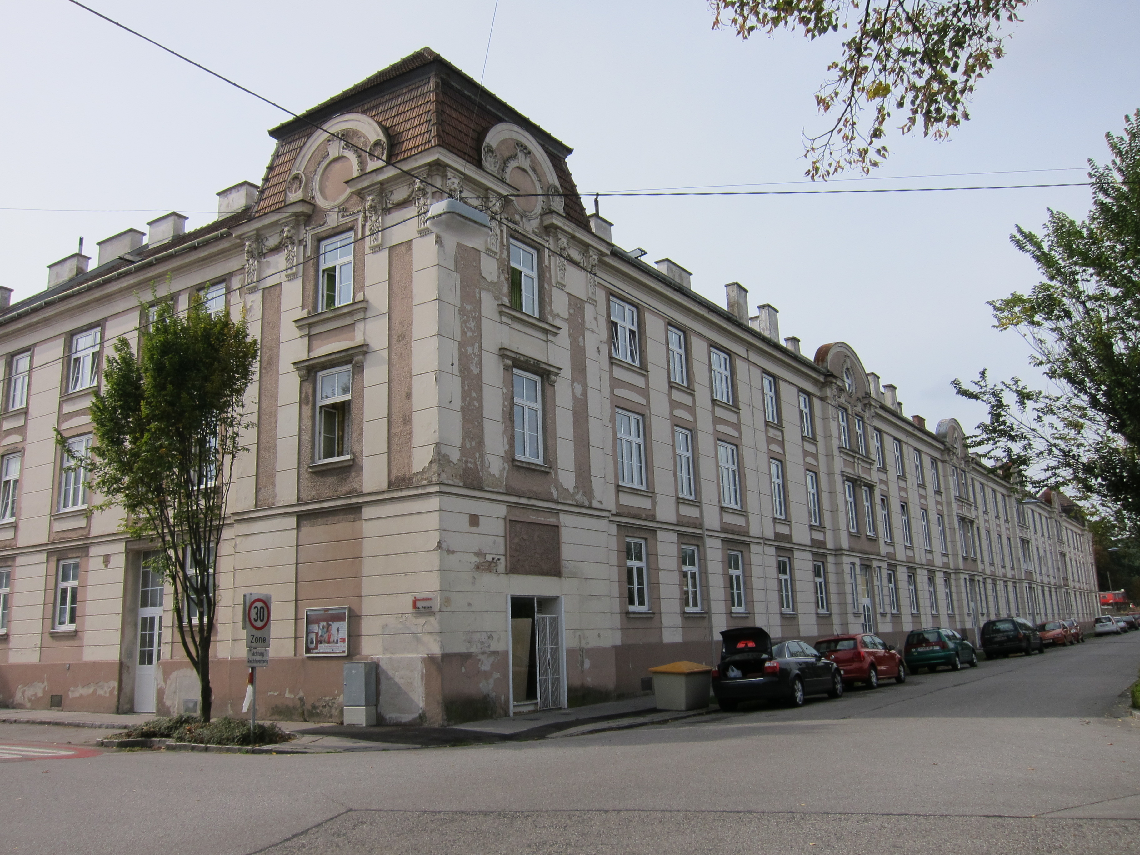 Wohnhaus, Teil einer Gebäudegruppe